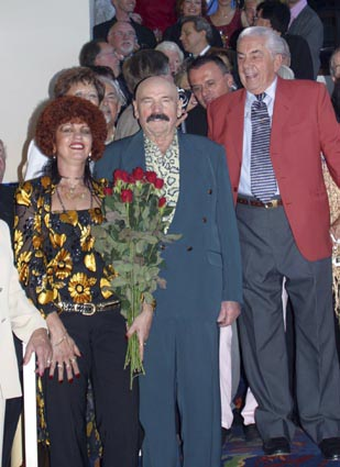 Hans Moretti an seinem 75. Geburtstag